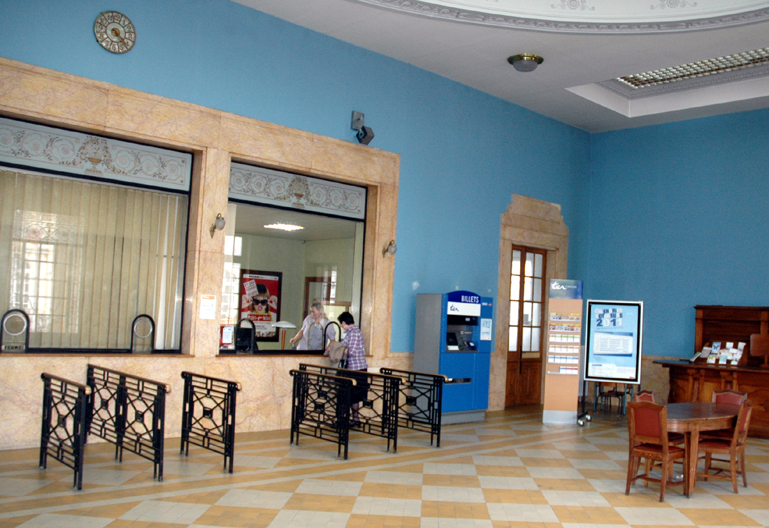 Schalterhalle im Gare de Vittel